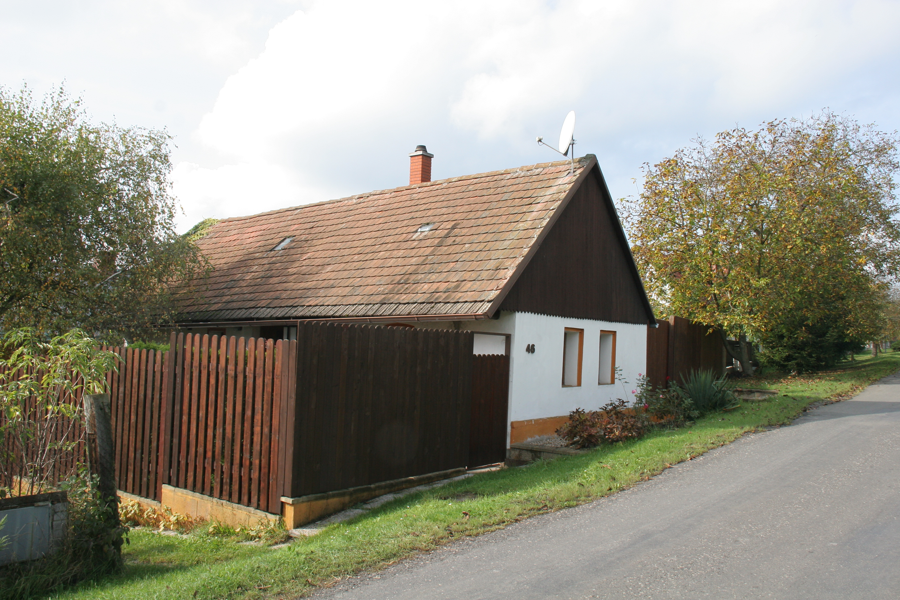 Hradčany 46